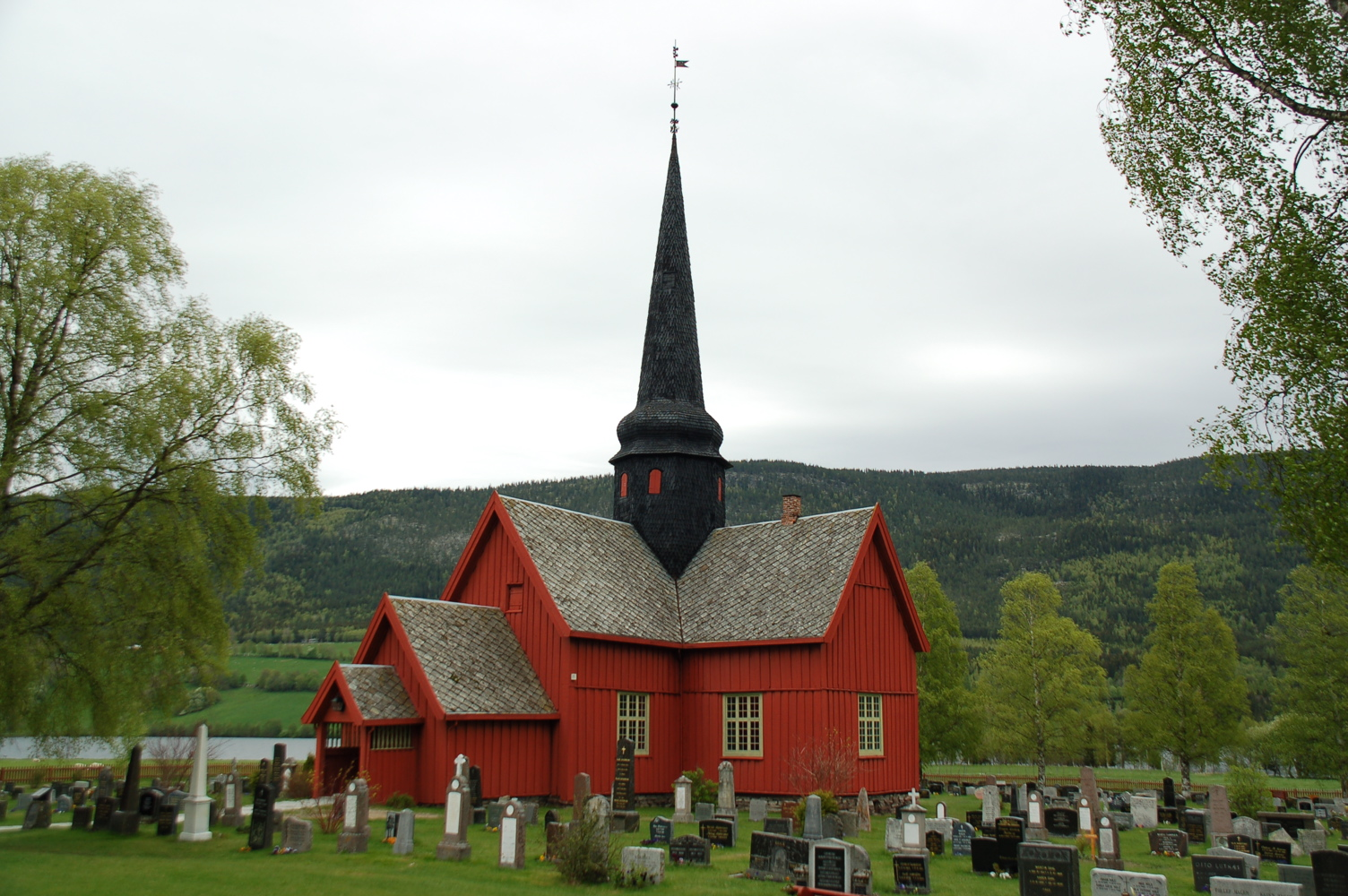 Ytre Rendal Church, Rendalen, Hedmark, Norway